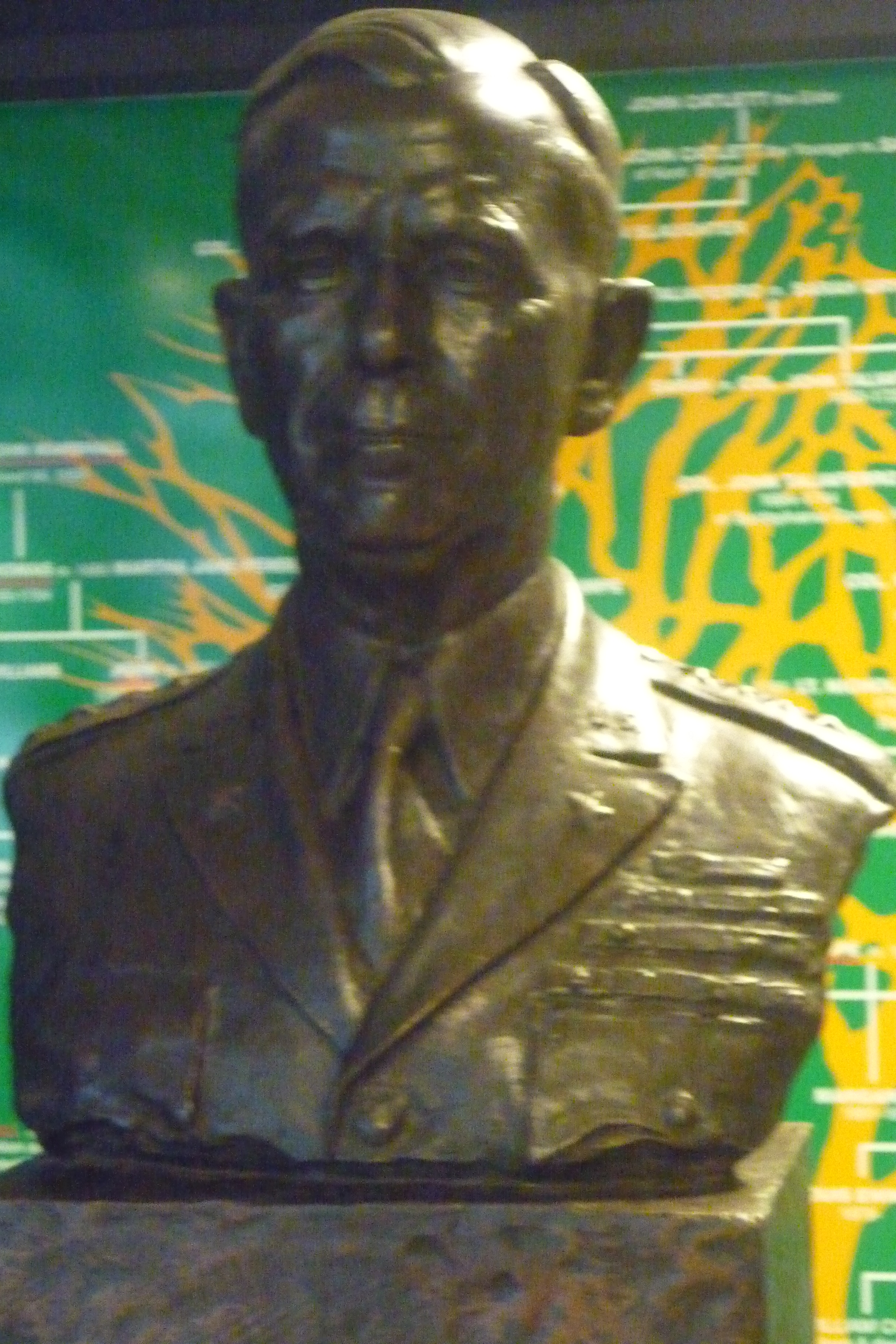 Generaal Whistler in het Oorlogsmuseum in Liberty Park